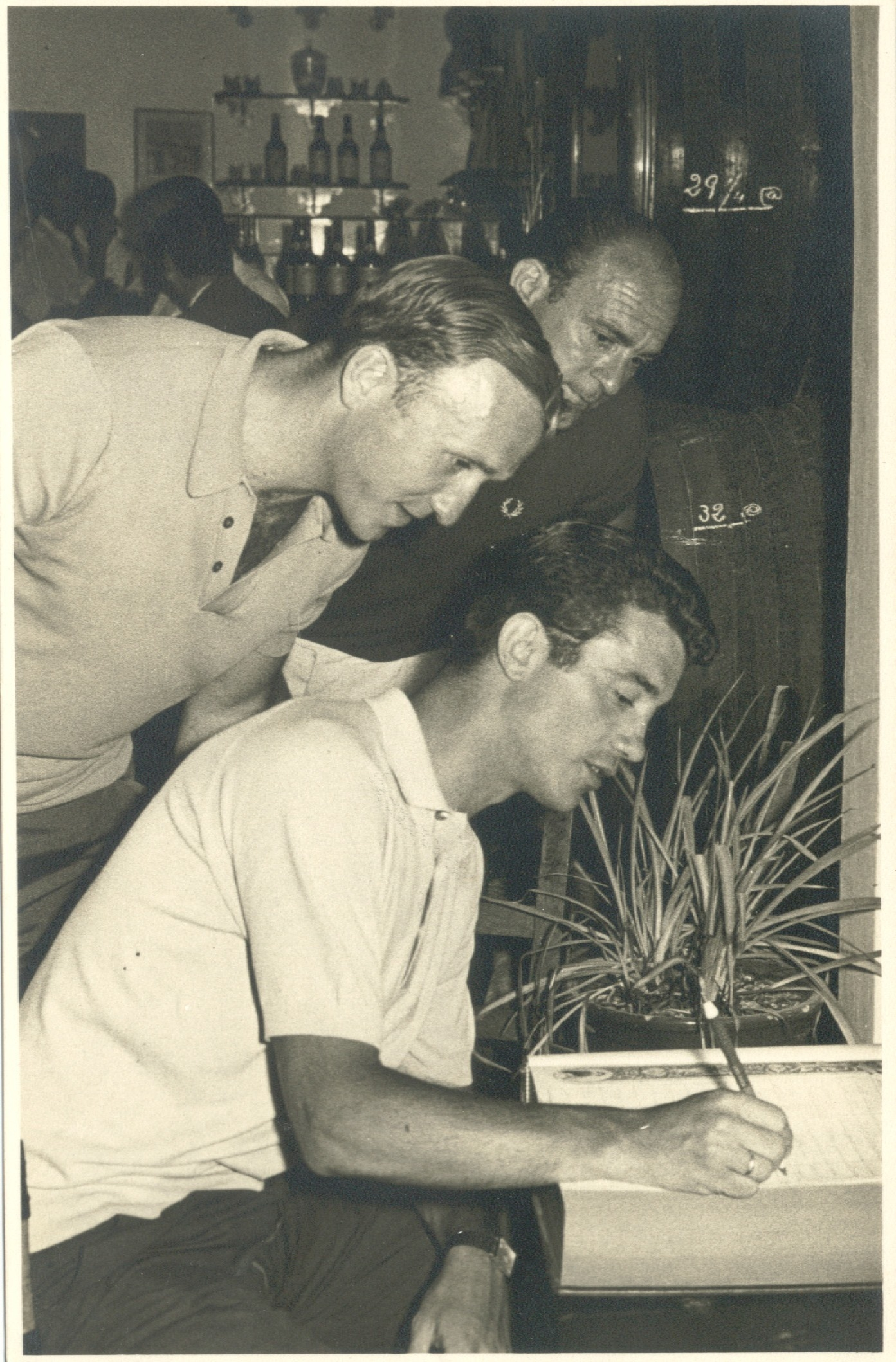 Isidro Sánchez García Figueras firmando en el libro de visita de las Bodegas Williams & Humbert Ltd., de Jerez de la Frontera, con motivo de su visita junto con Alfredo Di Stefano y José Santamaría